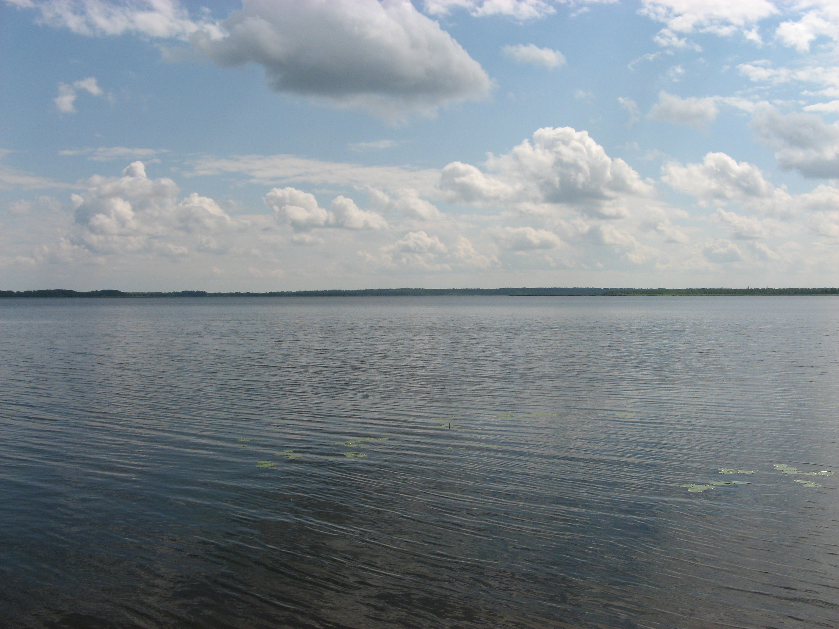 lake Seliger, Tver region Russia.